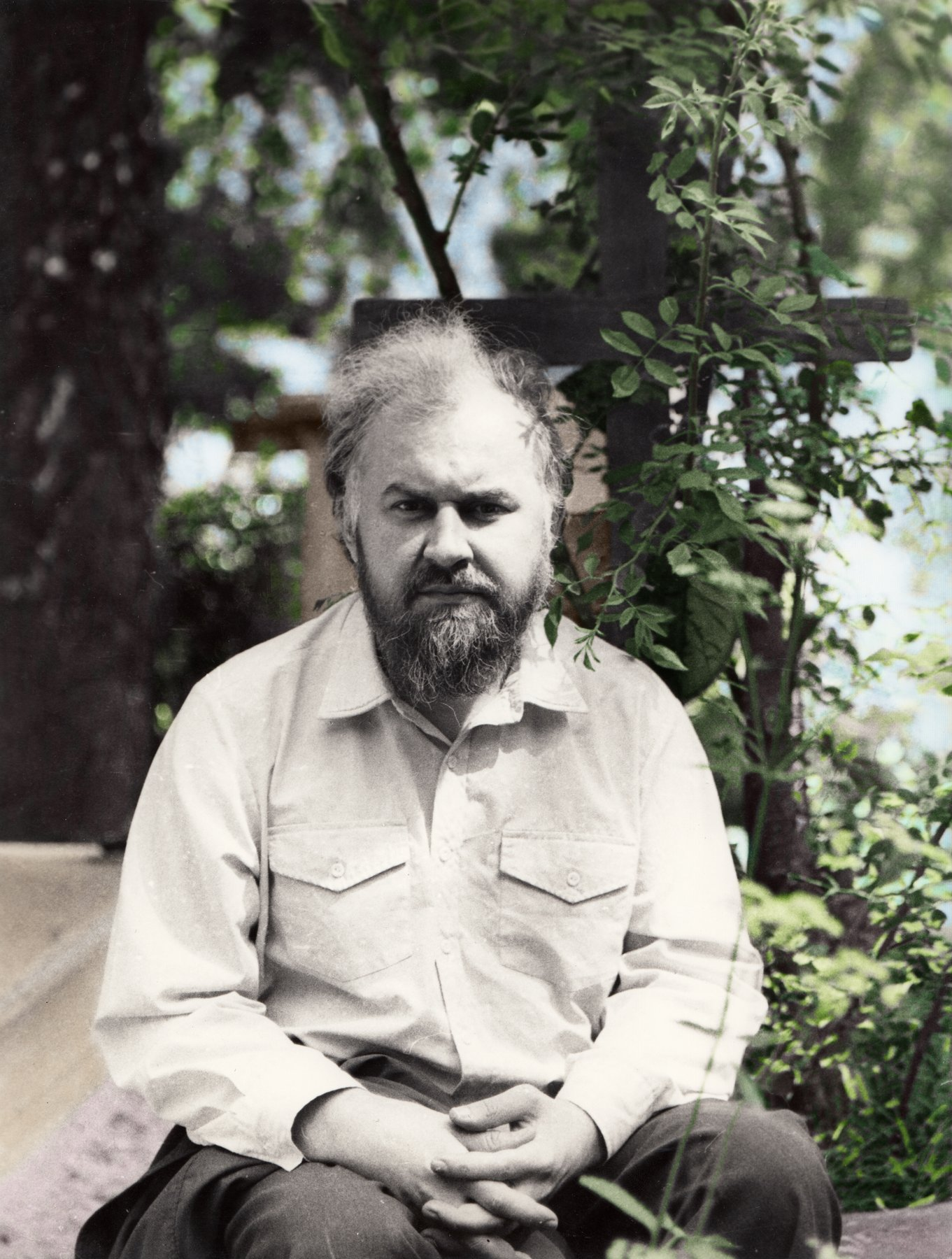 Posiadam prawa autorskie majątkowe do tej fotografii, którą mogę publikować wg uznania skutkiem zawartej umowy opłaconej kwotą 3 tys zł (za zbiór zdjęć - na zawsze)